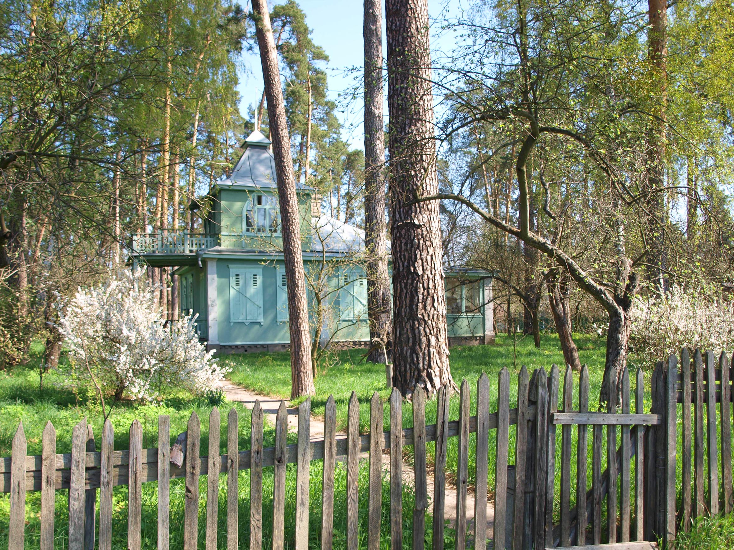 Дача у Ворзелі на вул. Тюльпанової, 6. Початок ХХ ст.